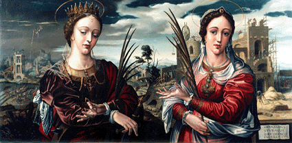 La obra representa a las mártires cristianas Santa Catalina de Alejandría y Santa Bárbara.